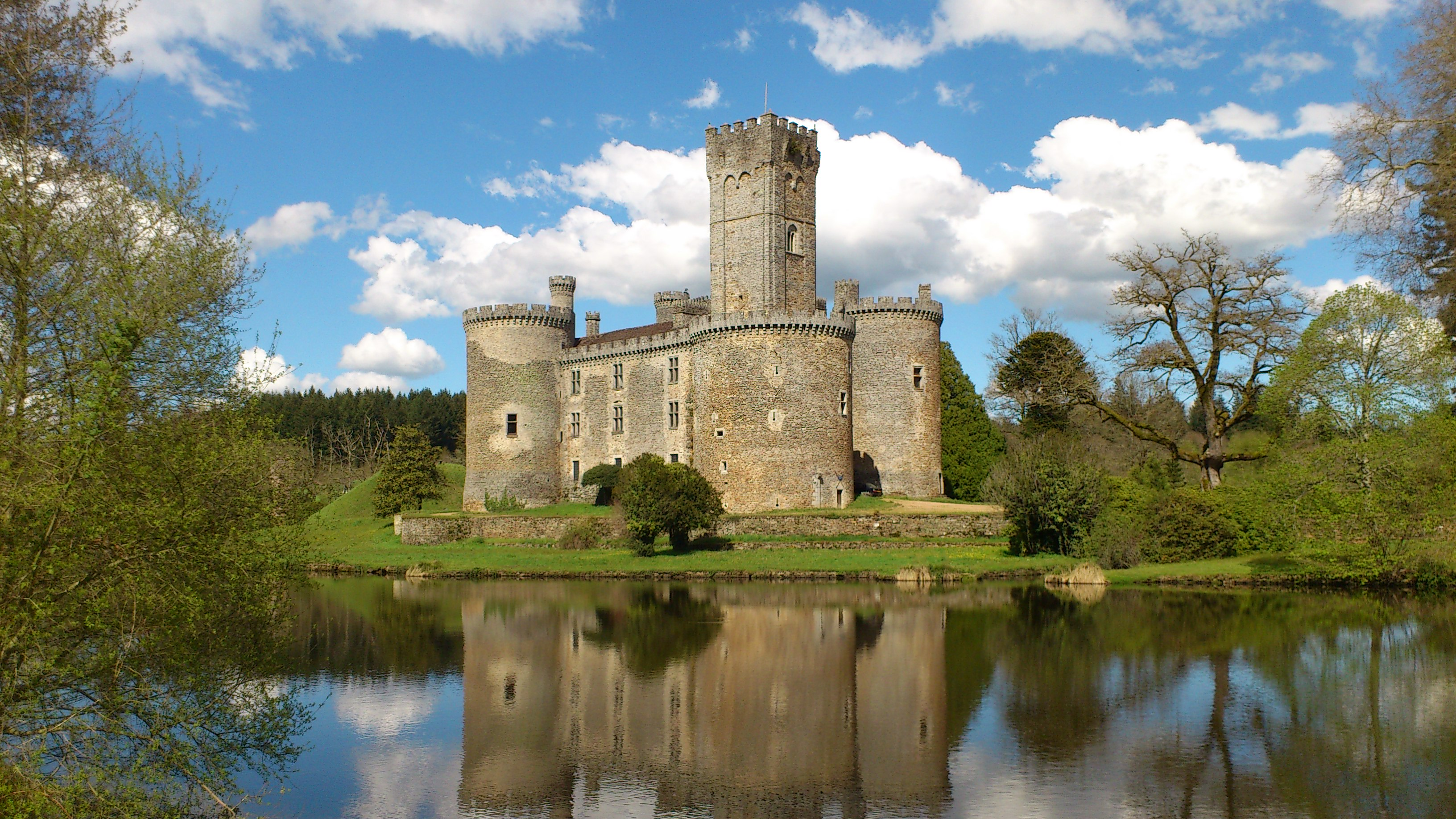 Photo du château de Montbrun à Dournazac en Haute-Vienne